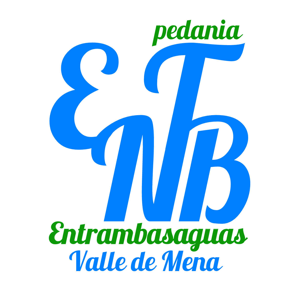 escudo